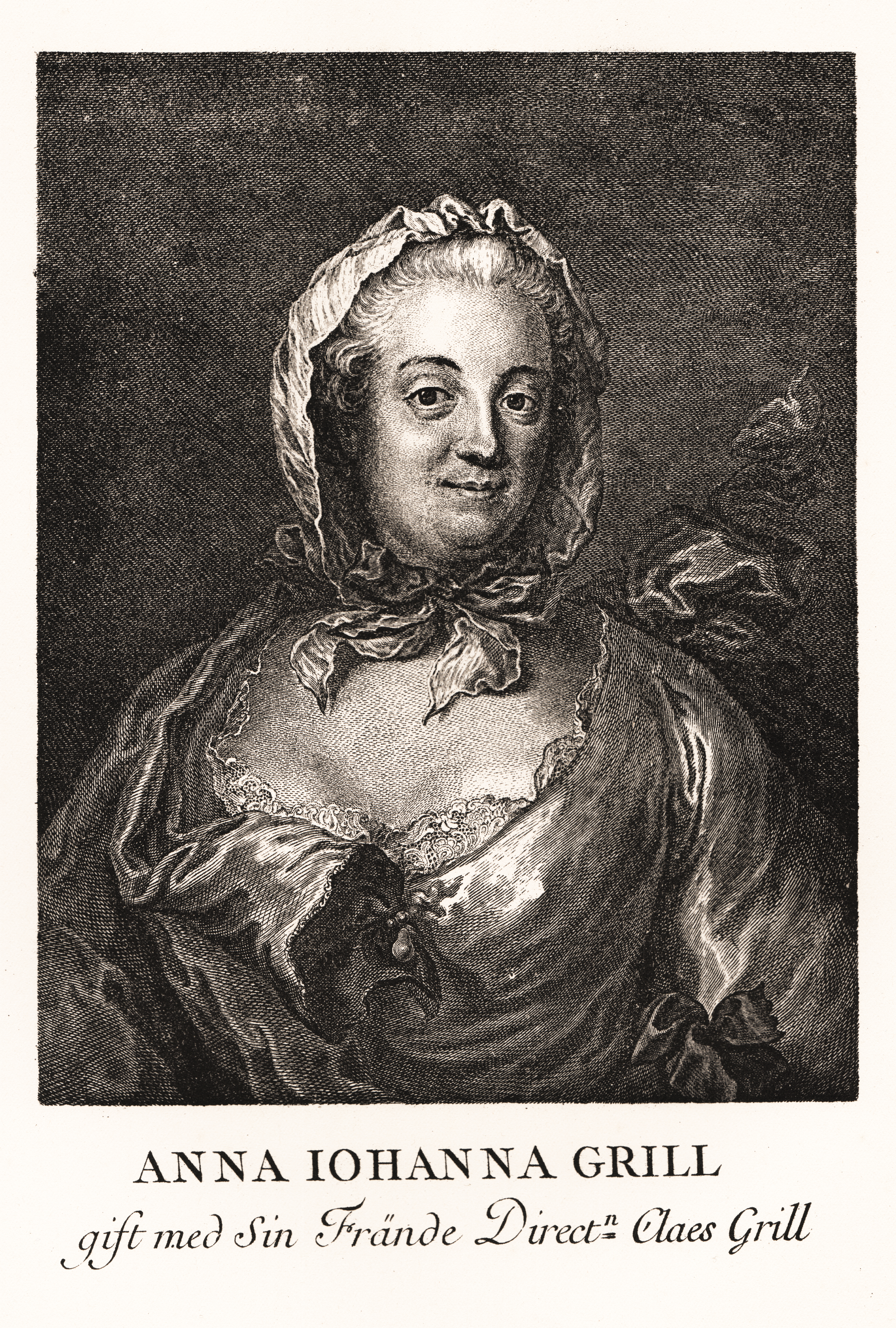 Anna Johanna Grill (1720-1778).